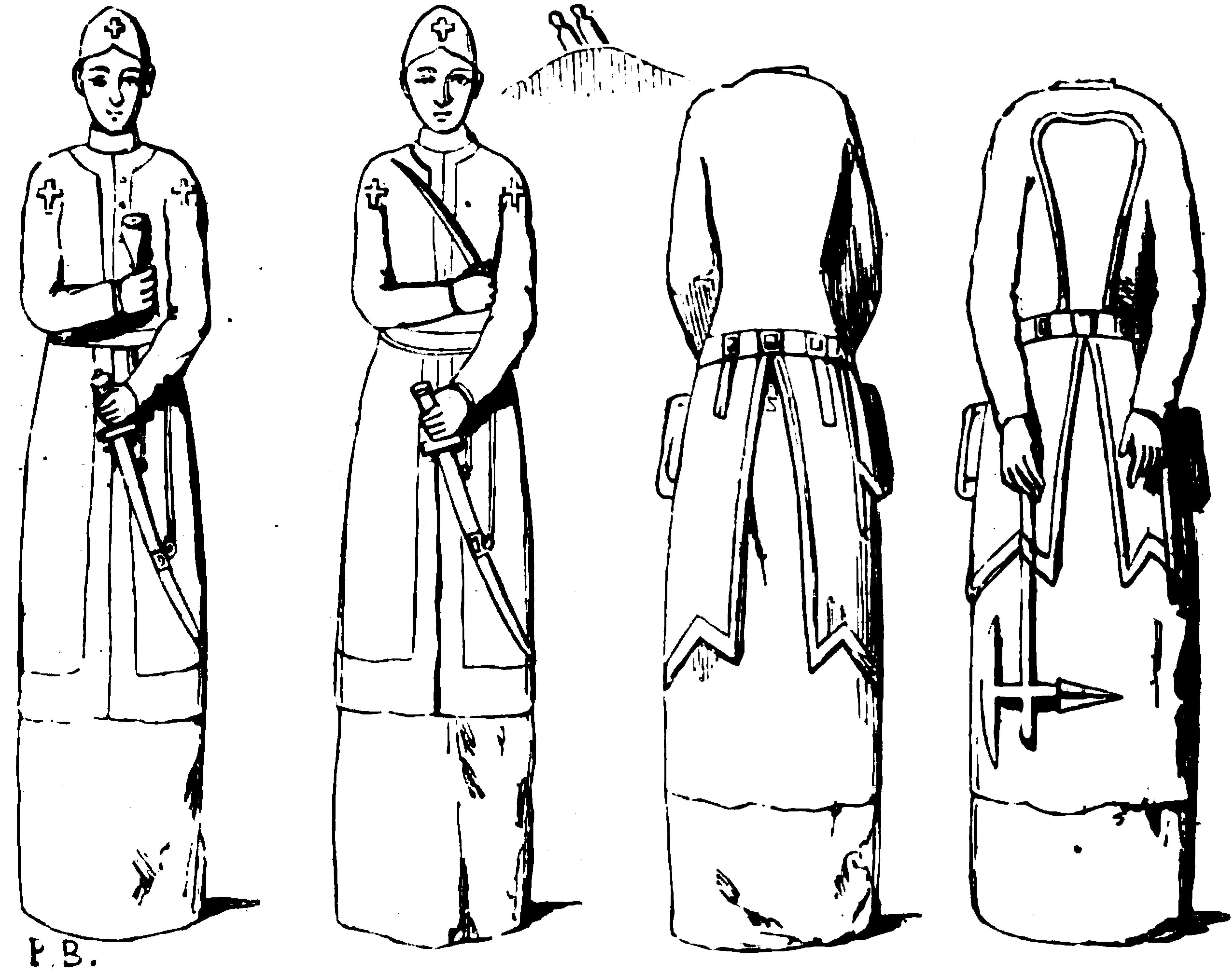 P.B. Statues chrétiennes a Yaktzyk. (A 60 verstes à l'ouest de cette église de Khoumara, à Yaktzyk près de Nadejinsky sur le Képhar, qui tombe dans le Zelentchouk, affluent de la rive gauche du Kouban, se sont trouvées des statues de guerriers et de prêtres armés, à ce qu'il semble, en costume ressemblant à celui des Tcherkesses, offrant sur les épaules et sur le devant du casque ou bonnet le signe de la croix grecque. Il paraît que dans la contrée il aurait existé trois cents statues semblables en pierre, se terminant en gaîne, de manière à être dressées sur un kouryane (tumulus), comme celles dont nous l'autre le bouclier qui, au besoin, les protège contre l'exaction. Autrement, la lutte ne serait qu'une œuvre d'extermination.) Floriant Gille. Lettres sur le Caucase et la Crimée. 1859